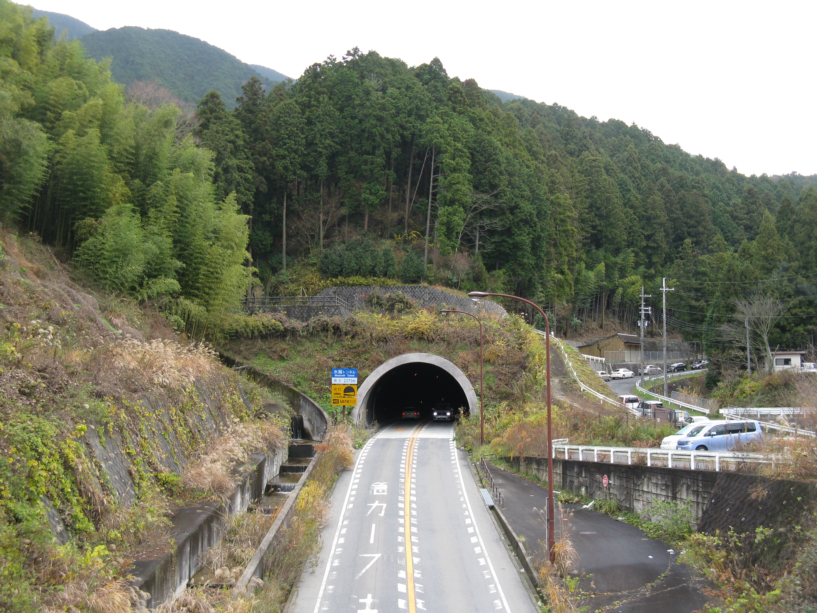 水越トンネル（大阪側より撮影）